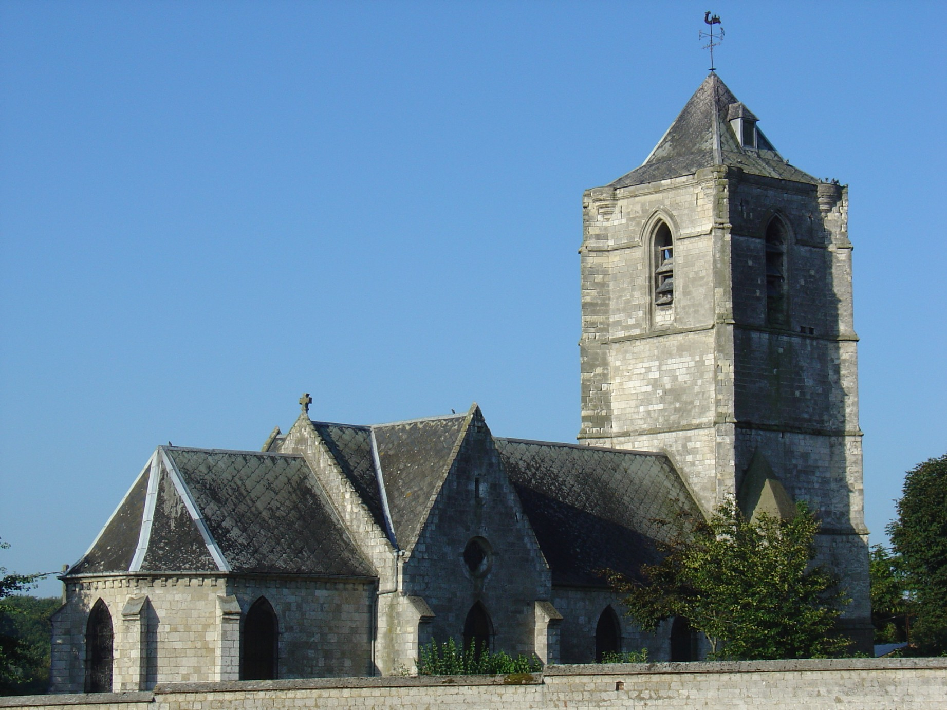 Église de Villers-au-Bois